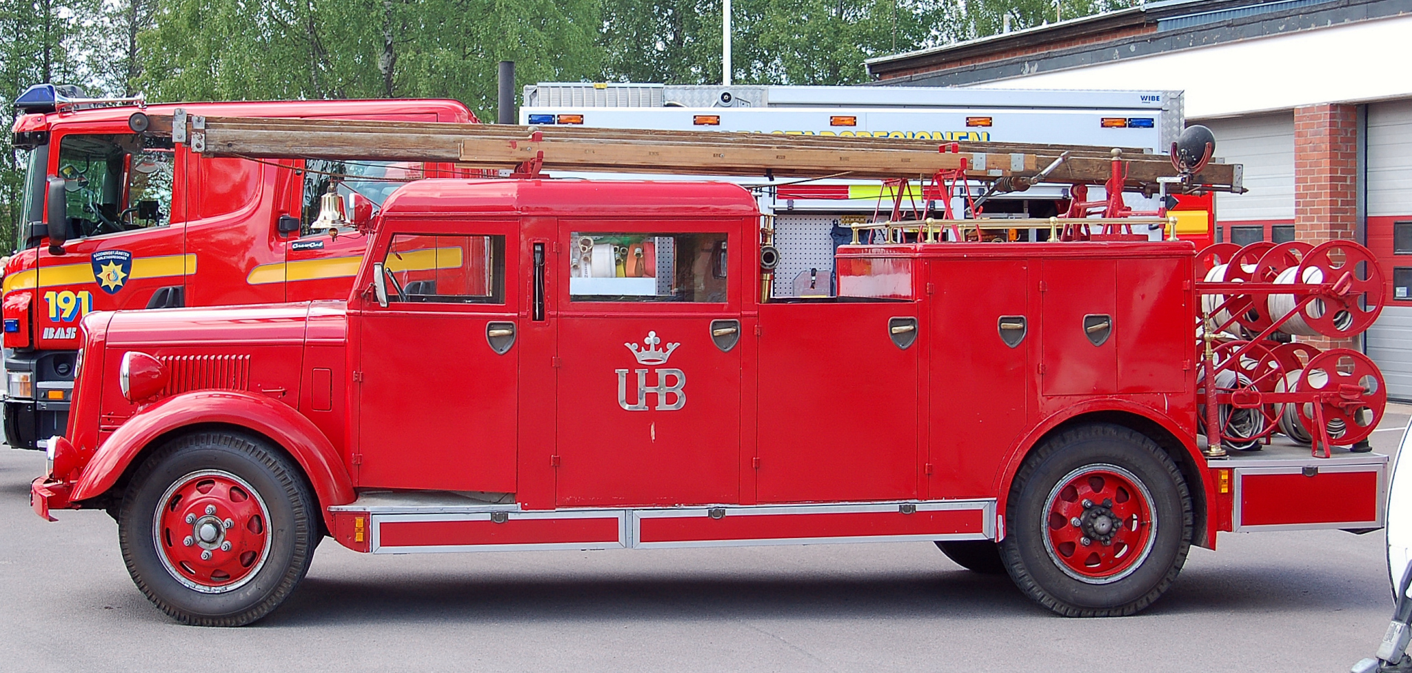 Volvo brandbil 1938. Ombyggnaden till redskapsbil utfördes av Vattholma Bruk i Uppland. Den levererades till Skoghallsverkens Elitbrandkår i april 1938. vid leveransen var brandbilen utrustad med en 14 meter lång utskjutsstege samt 4 stycken skarvstegar. Den hade 800 meter 63 mm brandslang som kunde kopplas till en pytsspruta. Fordonet har plats för 11 brandmän och den togs ur tjänst 1978.